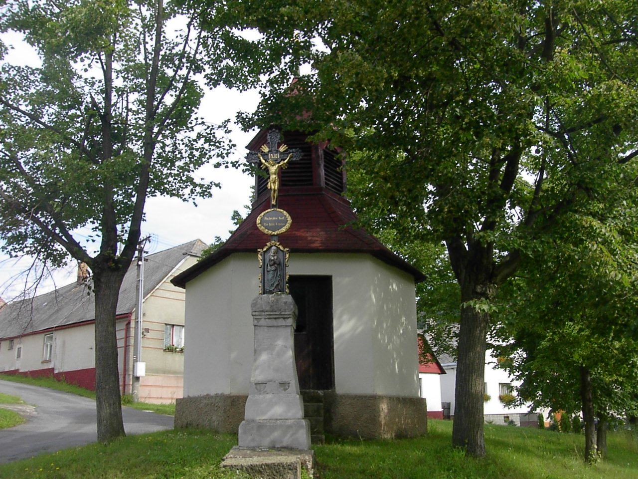 Kaplička v Těškově (RO).